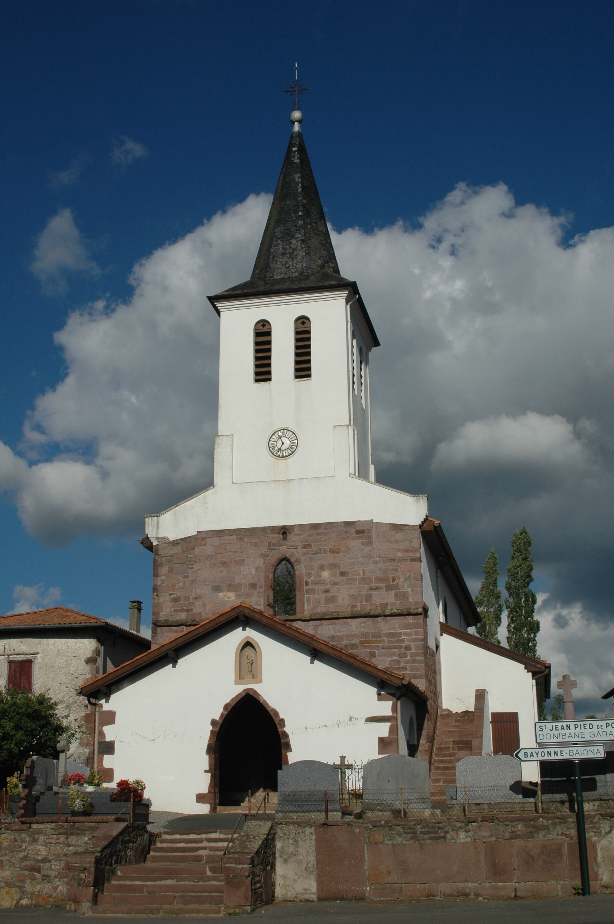 Ascarat, l'église. Photo prise le 03/08/06 par Harrieta171